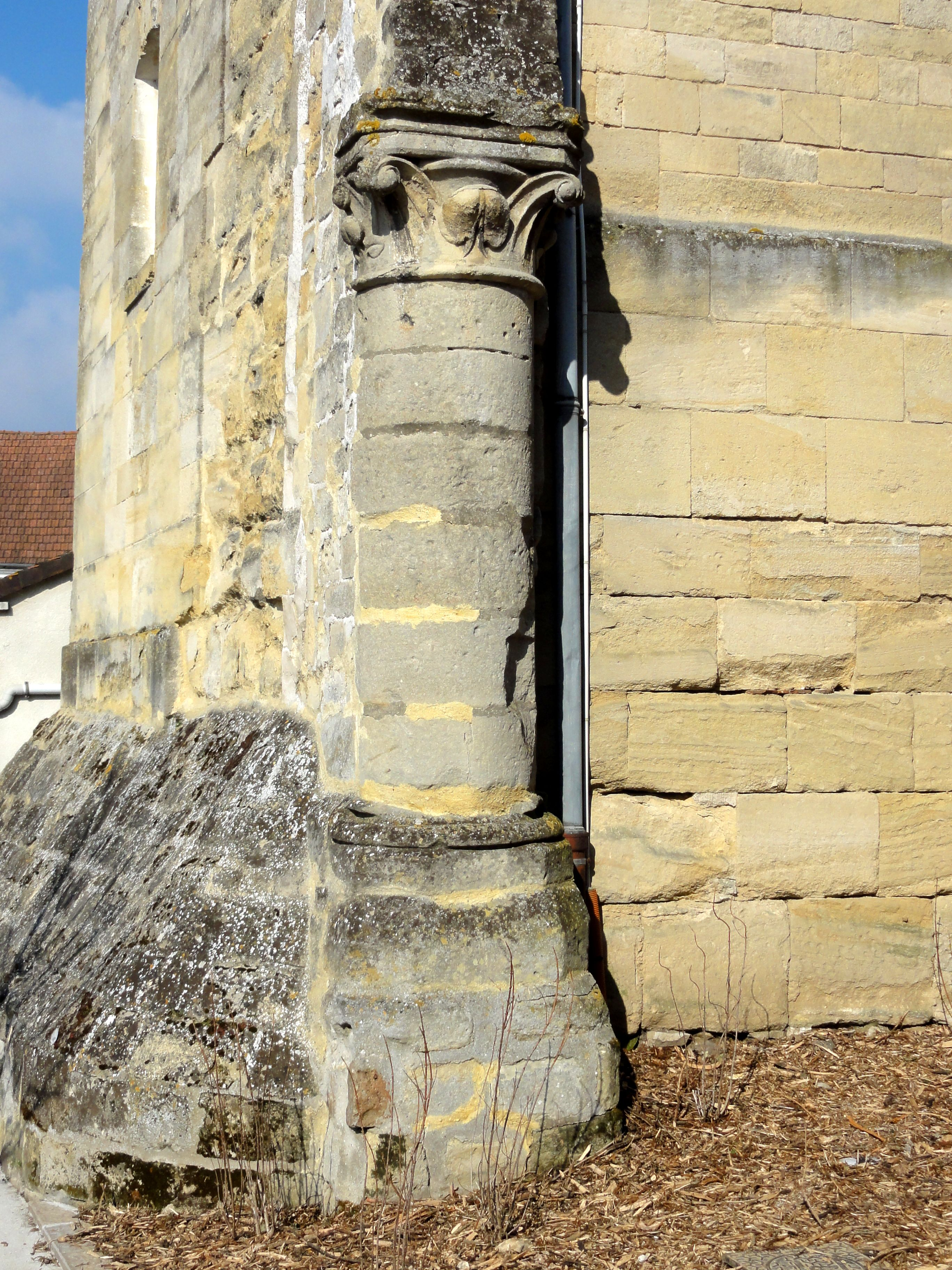 Pile de la nef disparue face à la façade occidentale.